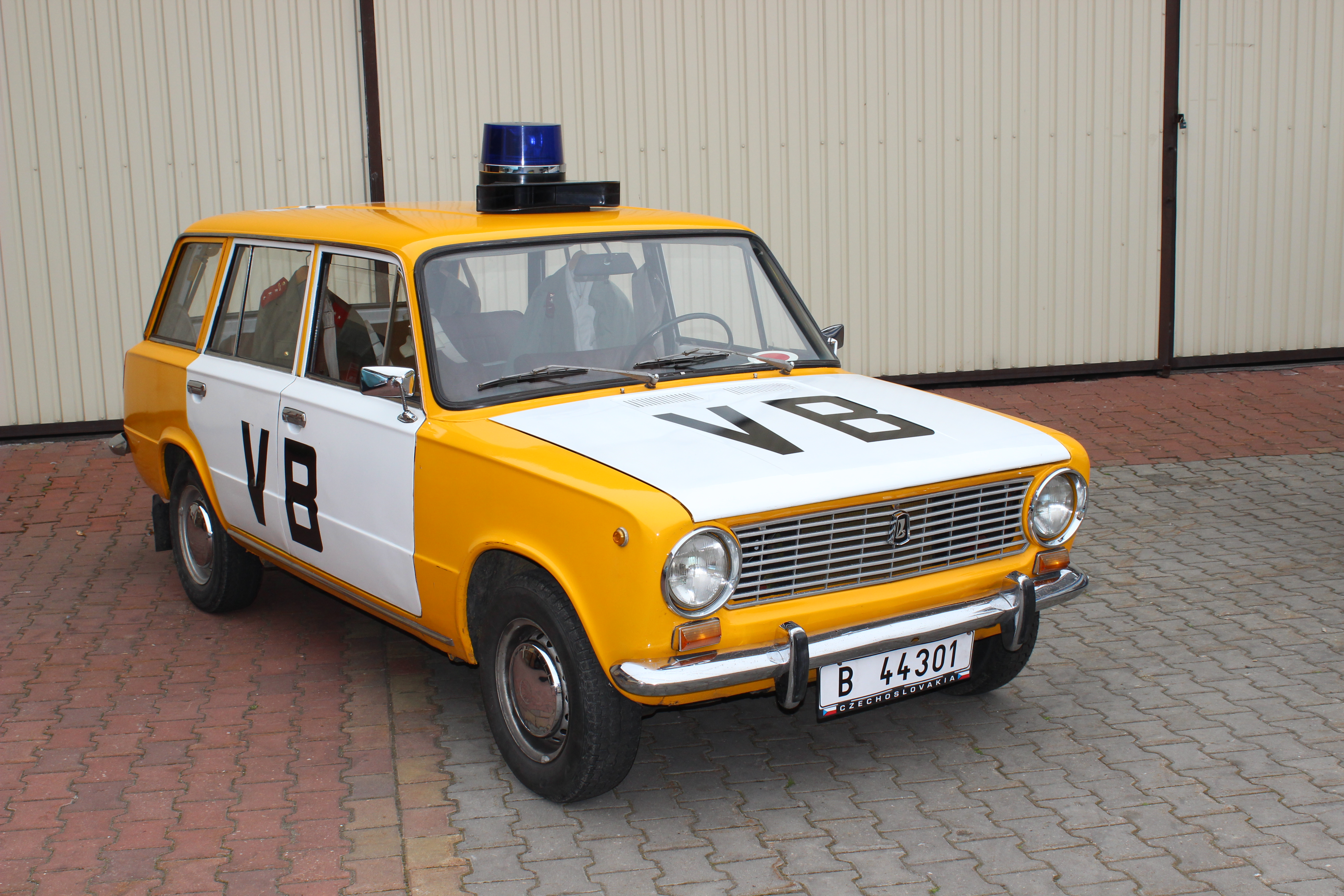 Automobil Lada 1200 Combi v barvách Veřejné bezpečnosti v Muzeu socialistických vozů v Kozovazech (východně od Prahy). This photograph was taken with a Canon EOS 600D.